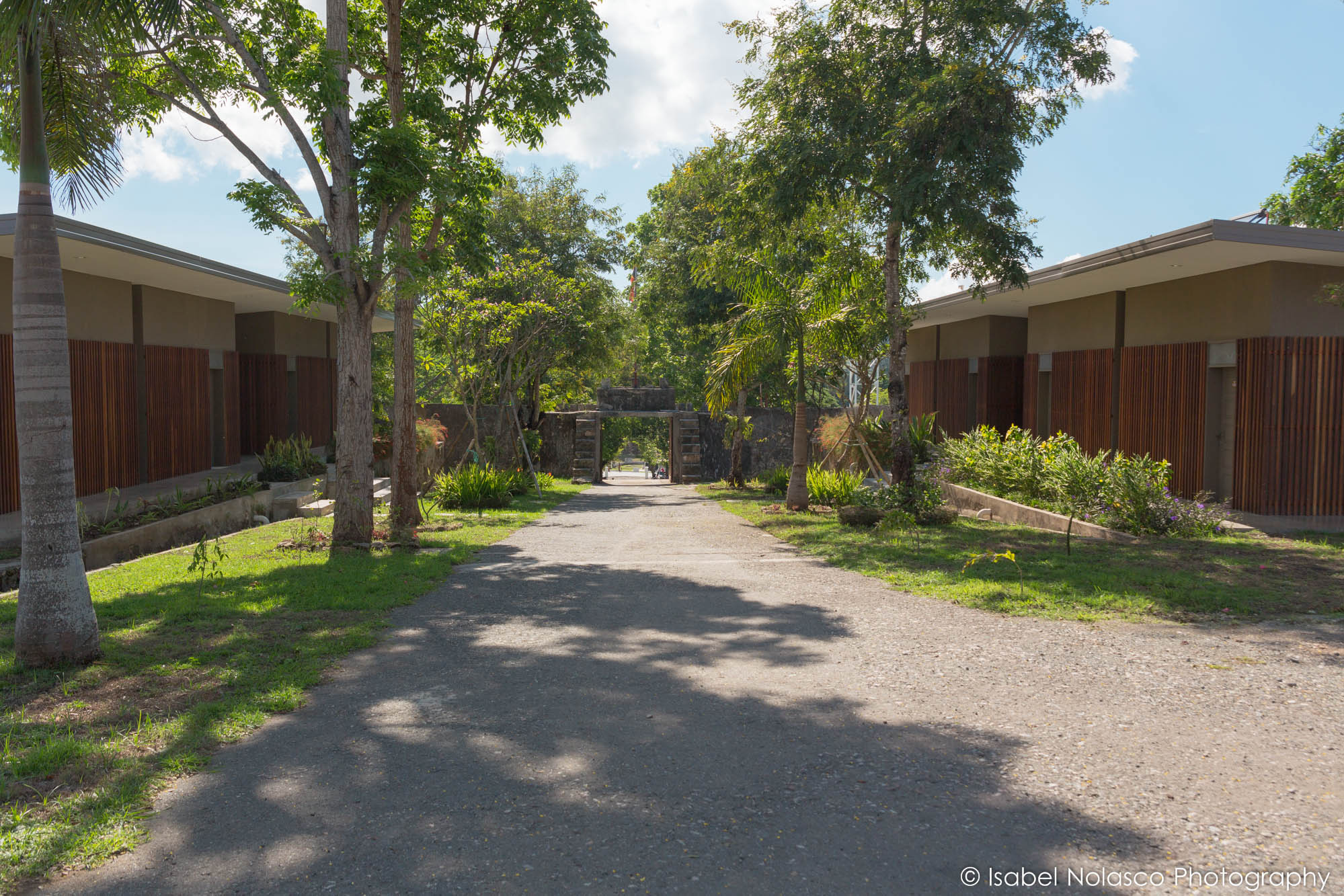 In der Festung Balibo